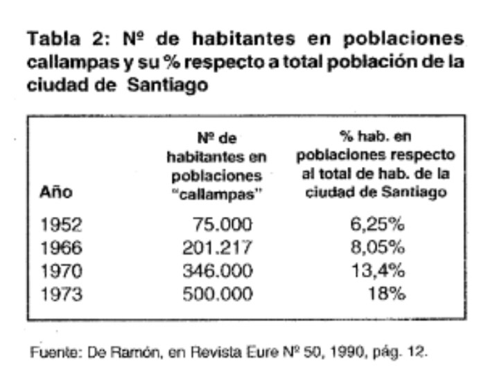 Gráfico con el número de habitantes en poblaciones callampas y su % respecto al total población de la ciudad de Santiago